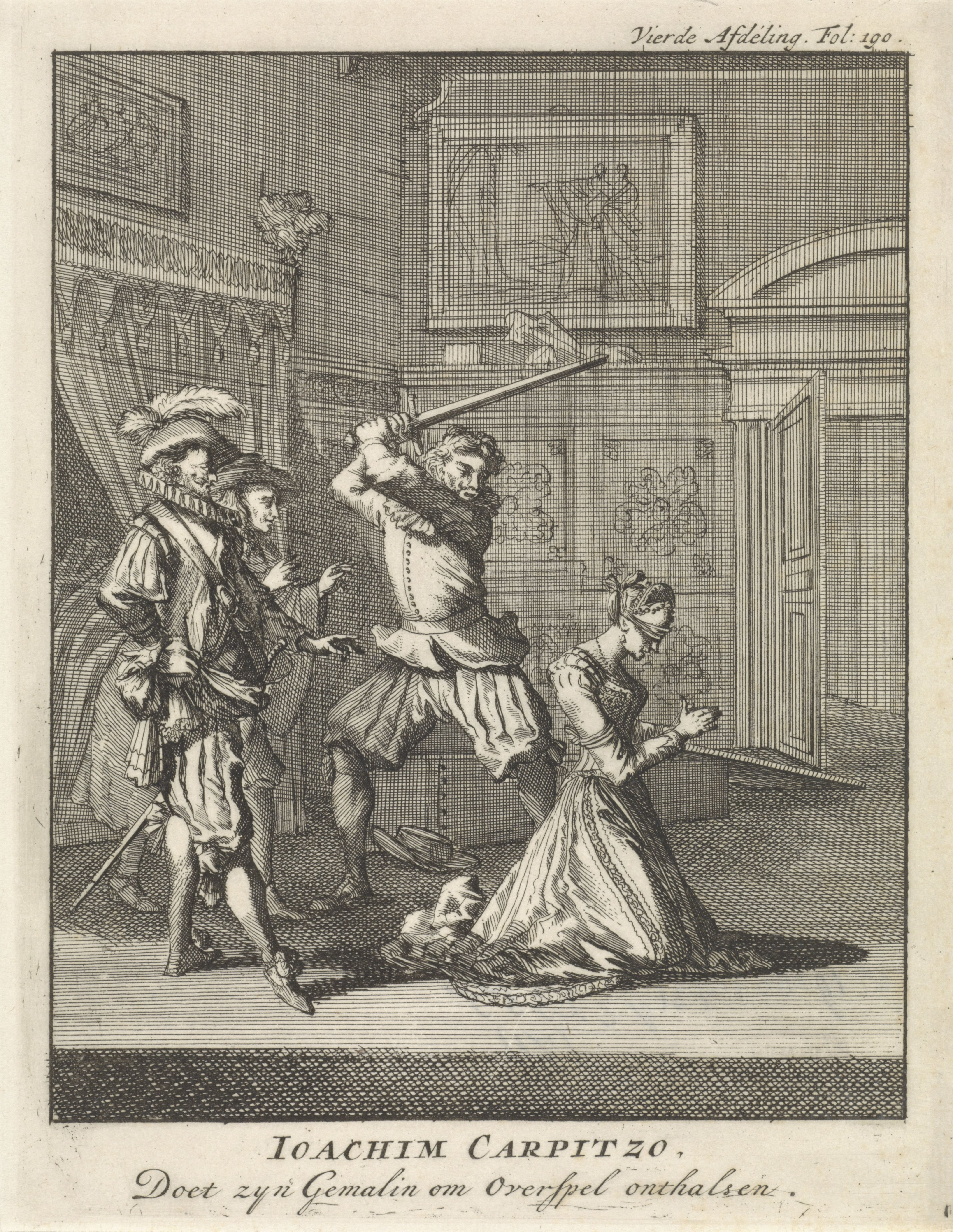 IdentificatieTitel(s): Joachim von Carpzov beveelt de onthoofding van zijn vrouw, 1623Joachim Carpitzo, Doet zyn Gemalin om Overspel onthalsen (titel op object)Objecttype: prent historieprent boekillustratie Objectnummer: RP-P-1896-A-19368-1731Catalogusreferentie: Van Eeghen 2355Collectie Rijksmuseum-2(3)Opmerking: 2(3) aan de hand van aanwezige staten Rijksmuseum.Opschriften / Merken: verzamelaarsmerk, verso midden onder, gestempeld: Lugt 2228Omschrijving: Een kamerinterieur. Joachim von Carpzov, officier in Oost-Friesland, staat voor een bed en beveelt de executie van zijn vrouw vanwege vermeende ontrouw. Zijn vrouw zit geknield naast hem, met achter haar de beul met het zWaar: d in de handen.VervaardigingVervaardiger: prentmaker: Jan Luyken (vermeld op object)naar tekening van: Jan Luykenuitgever: Jan Claesz ten HoornPlaats vervaardiging: AmsterdamDatering: 1699Fysieke kenmerken: etsMateriaal: papier Techniek: etsenAfmetingen: blad: h 194 mm × b 151 mmToelichtingBoekillustratie voor: Zanten, Laurens van. Treur-tooneel der doorluchtige vrouwen, of Op en ondergang der vorstinnen. Amsterdam: Jan ten Hoorn, 1699, dl. 4, p. 190.OnderwerpWat: death penalty, executionviolent death by beheadingadultery revengedWanneer: 1623 - 1623WaarOost-FrieslandWie: Joachim von CarpzovVerwerving en rechtenVerwerving: aankoop jul-1896Copyright: Publiek domein